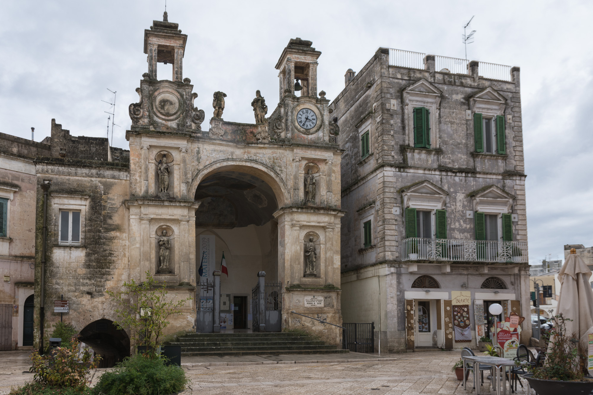 Palazzo del Sedile This is a photo of a monument which is part of cultural heritage of Italy.